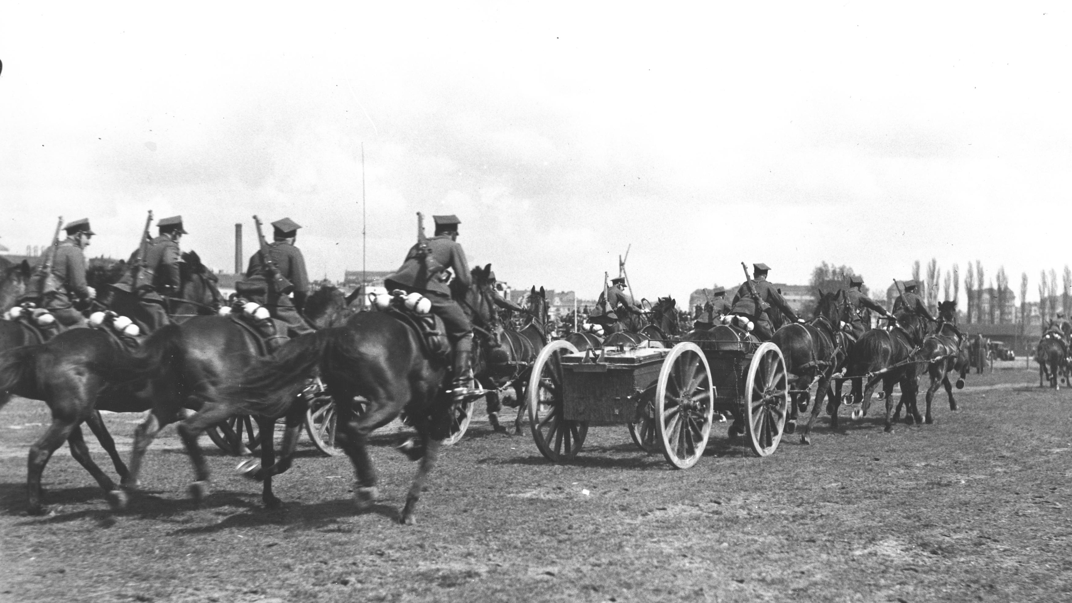 Uroczystości święta 3 Maja w Warszawie w 1938 r. Artyleria konna udaje się na pozycję podczas pokazów wojskowych na Polu Mokotowskim. Koncern Ilustrowany Kurier Codzienny - Archiwum Ilustracji. Sygnatura: 1-P-2876-29